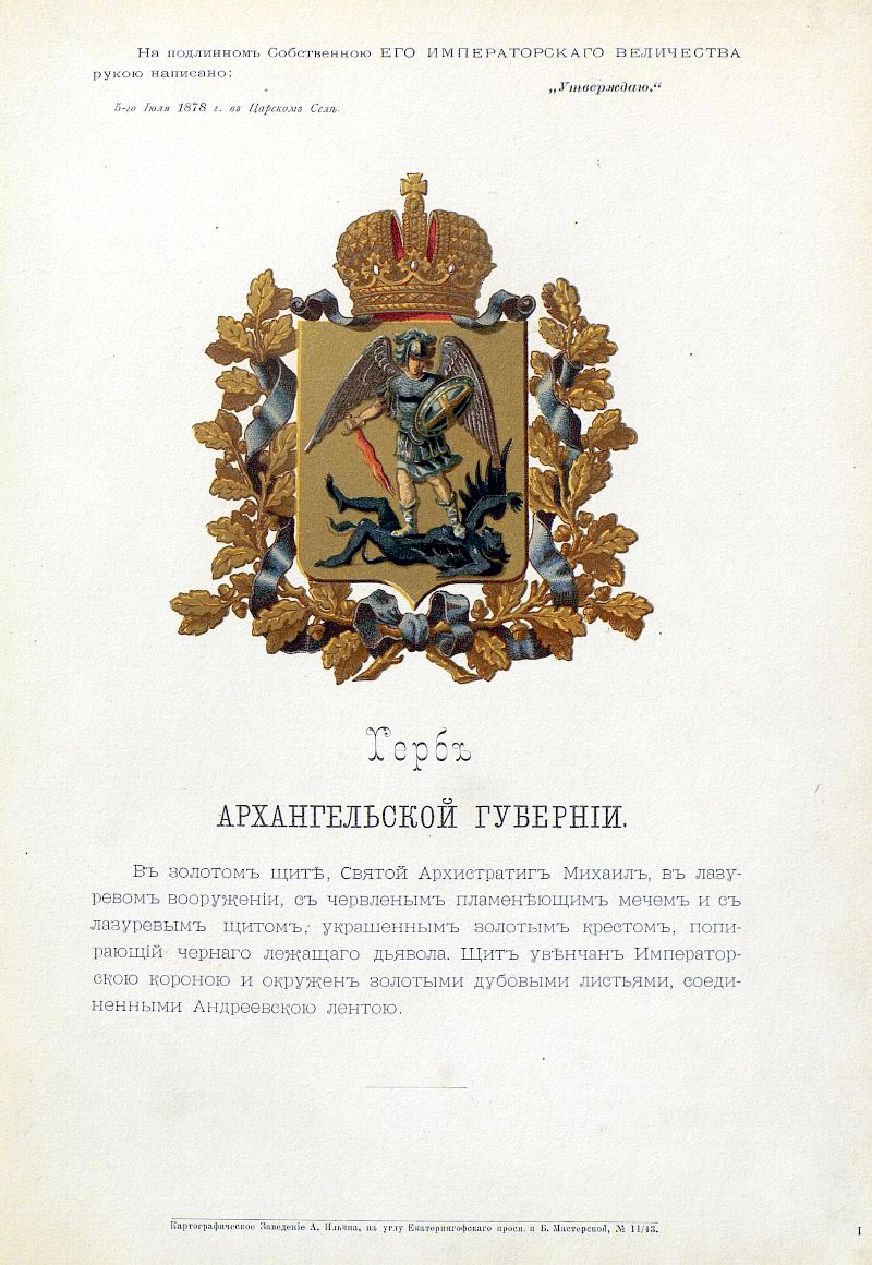 Official Russian Empire coat of arms Arkhangelsk Governorate. Гласный герб Российской Империи Архангельской губернии с официальным описанием в Гербовнике Министерства внутренних дел Российской Империи 1880 года. Утверждён Императором Всероссийским Александром Вторым 5 июля 1878 года.